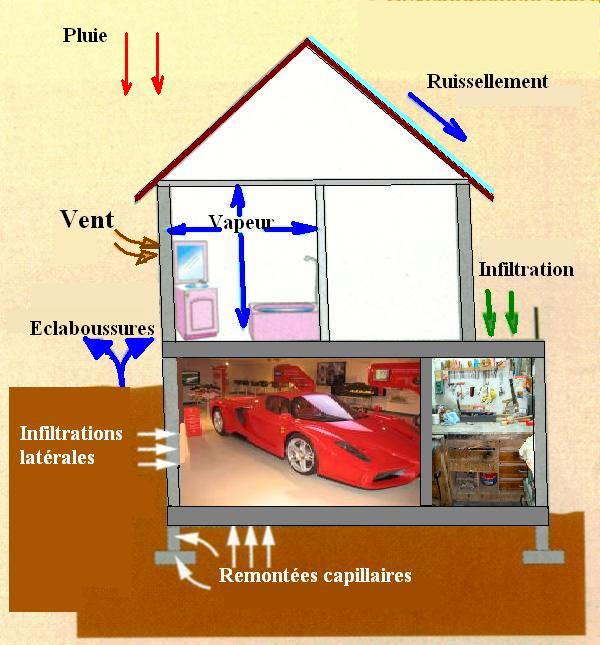 Schéma de l'action de l'humidité sur une construction.